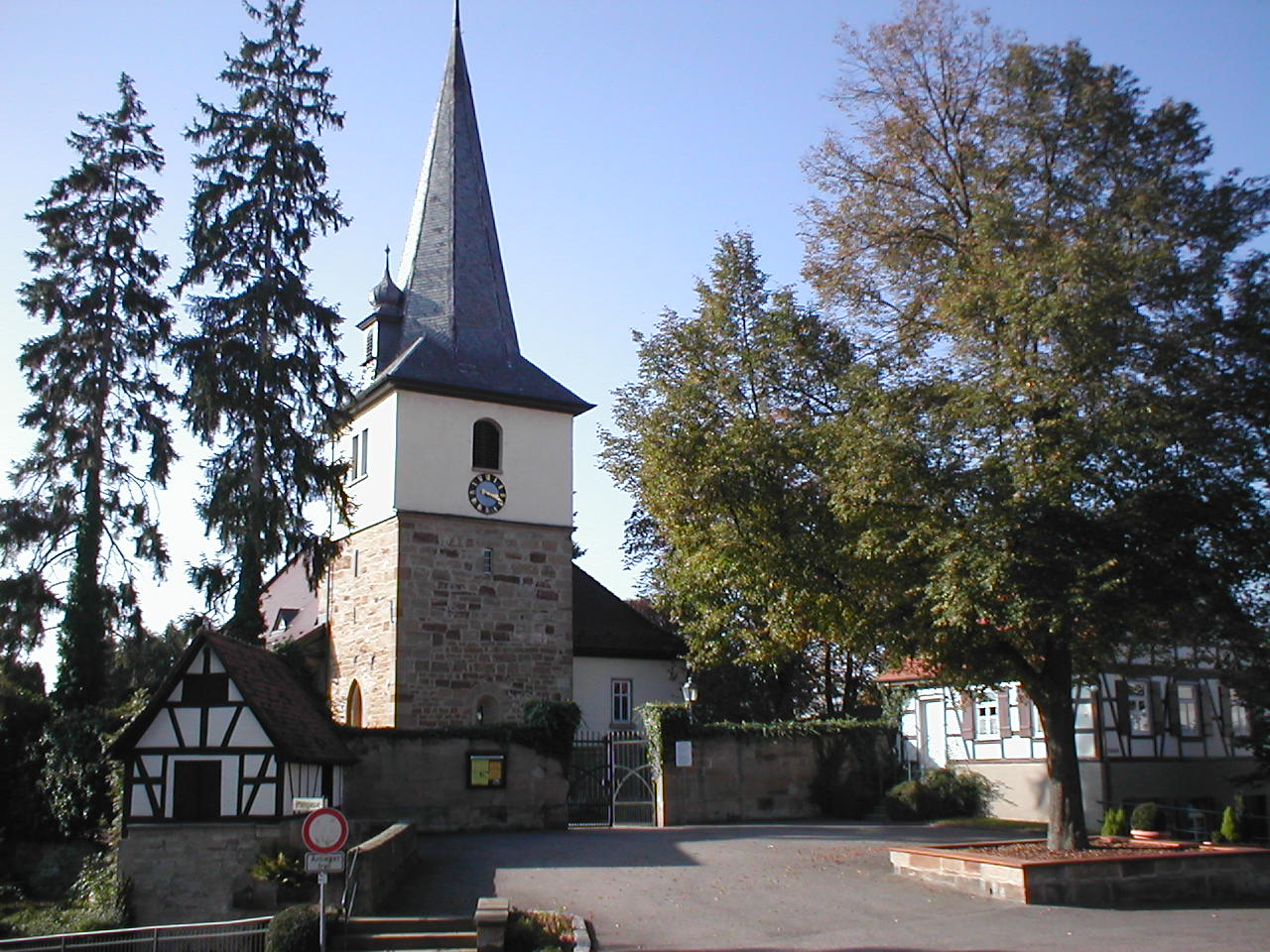 Wehrkirche in Brettach. Die Kirche in Brettach mit einem Portal von 1518 geht auf einen sehr alten, vermutlich alemannischen Kultplatz an einer Quelle zurück. Im hohen Mittelalter wurde die Kirche zu einer von Mauern umgebenen Wehrkirche mit Wehrgraben ausgebaut. Die Anlage umfasste neben der Kirche noch 23 so genannte Gaden, die als Fruchtlagerschuppen mit Gewölbekellern, aber auch als Zufluchtsstätten der Bevölkerung innerhalb der Wehranlage genutzt wurden. Um 1570 wurde der Wehrgraben zugeschüttet, wodurch der Lindenplatz vor der Kirche entstand. Die zum Kirchbrunnen gefasste Quelle wurde mit einem Gewölbe überdacht. Die Gaden wurden ab 1578 zerstört oder abgerissen, heute ist nur noch eine erhalten, die noch im 19. Jhd. als Gemeindegefängnis diente. In den Pestjahren im Dreißigjährigen Krieg wurde das so genannte Pesttor in die Wehrmauer gebrochen. Im 19. Jhd. wurde das Gewölbe über dem Kirchbrunnen zu einer Gesamttiefe von 17 m erweitert, wodurch der Lindenplatz vergrößert werden konnte. An der Kirche befinden sich außerdem zwei Kriegerdenkmale für die örtlichen Gefallenen beider Weltkriege.